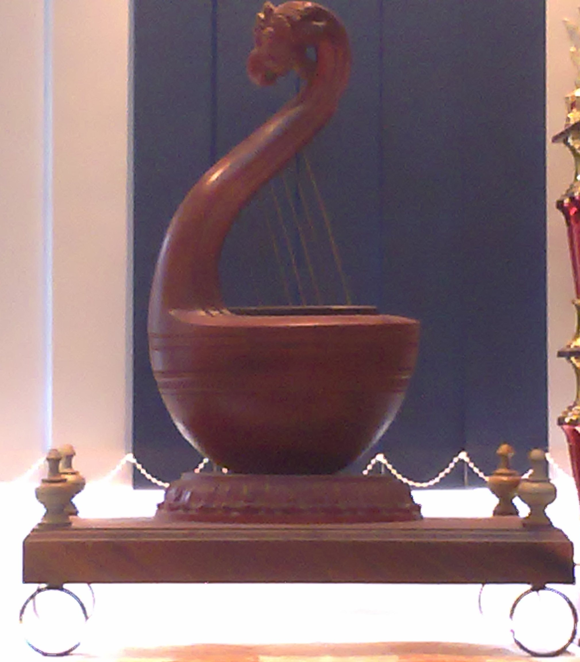 யாழ்ப்பாணம் பிரதேச சபையில் உள்ள யாழ் மண்ணை பிரதிபலிக்கும் மரத்தினால் ஆன யாழ் சின்னம்.